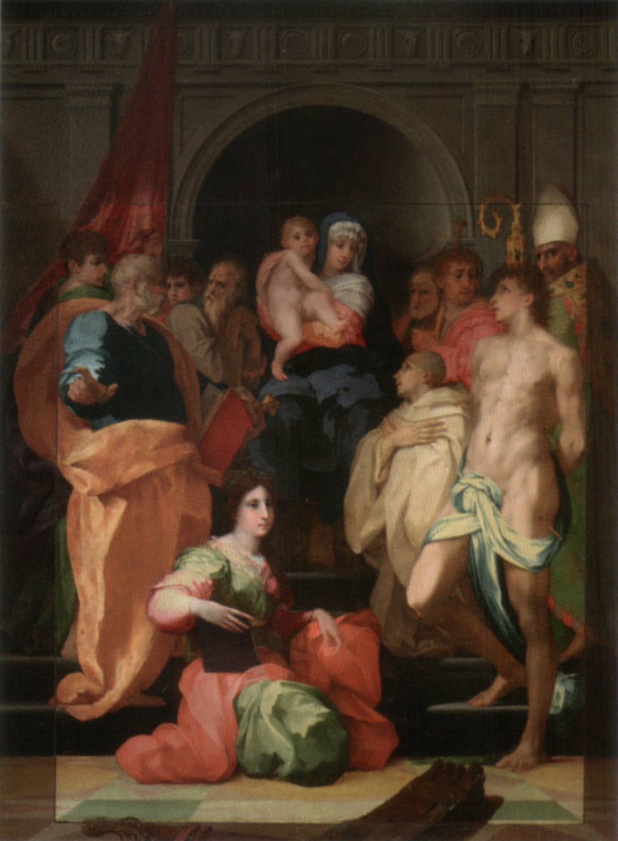 Pala Dei